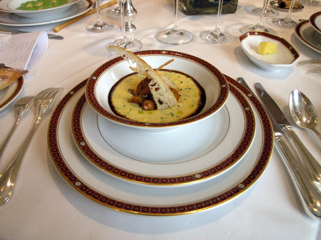 Cuisine " Trois étoiles "